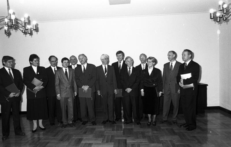 Dresden, Kabinett des Freistaat Sachsen ADN/Matthias Hiekel/ 8.11.90 Dresden: Kabinett Der Freistaat Sachsen hat seit heute eine vereidigte Staatsregierung. Dem Kabinett gehören an (v.l.n.r., ab 3. Person): Dr. Hans Geisler, Minister für Soziales, Gesundheit und Familie; Arnold Vaatz, Chef der Sächsischen Staatskanzlei im Range eines Ministers; Dr. Karl Weise, Minister für Umwelt und Landesentwicklung; Dr. Rudolf Krause, Innenminister; Dr. Rolf Jähnichen, Minister für Landwirtschaft, Ernährung und Forsten; Dr. Kajo Schommer, Minister für Wirtschaft und Arbeit; Prof. Dr. Kurt Biedenkopf, Ministerpräsident; Prof. Hans-Joachim Meyer, Wissenschaftsminister; Stefanie Rehm, Kultusminister; Steffen Heitmann, Justizminister; Prof. Dr. Georg Milbradt, Finanzminister. Abgebildete Personen: Geisler, Hans Dr.: Volkskammerabgeordneter, Demokratischer Aufbruch (DA), DDR Vaatz, Arnold: Minister, Chef der Sächsischen Staatskanzlei, Bundesrepublik Deutschland Weise, Karl Dr.: 1990 Minister für Umwelt und Landesentwicklung in Sachsen, DDR Jähnichen, Rolf Dr.: Minister für Landwirtschaft, Ernährung und Forsten Sachsen, CDU, Bundesrepublik Deutschland Krause, Rudolf: 1990 Innenminister, Sachsen, CDU, DDR Schommer, Kajo Dr.: 1990 Minister für Wirtschaft und Arbeit des Freistaates Sachsen, Bundesrepublik Deutschland (GND 112918999) Biedenkopf, Kurt Prof. Dr.: Ministerpräsident von Sachsen, CDU, Bundesrepublik Deutschland Meyer, Hans Joachim Prof. Dr.: Minister für Bildung und Wissenschaft, DDR (GND 120569736) Rehm, Stefanie: 1990 Volkskammerabgeordnete, CDU, Kultusministerin, DDR Heitmann, Steffen: Justizminister, Sachsen, Bundesrepublik Deutschland Milbradt, Georg: Finanzminister, Ministerpräsident von Sachsen, CDU, Bundesrepublik Deutschland